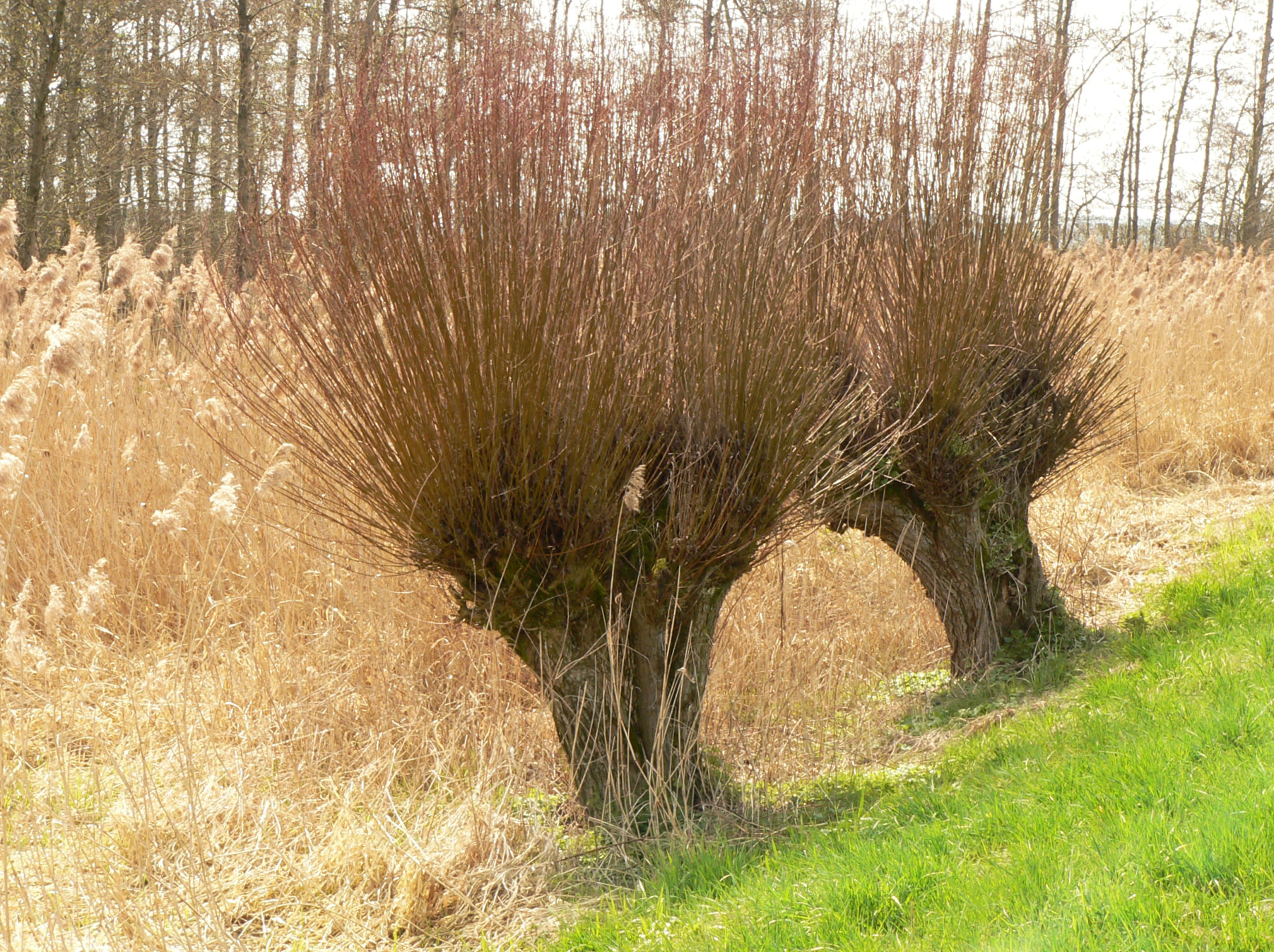 Zwei Kopfweiden im Naturschutzgebiet Okeraue